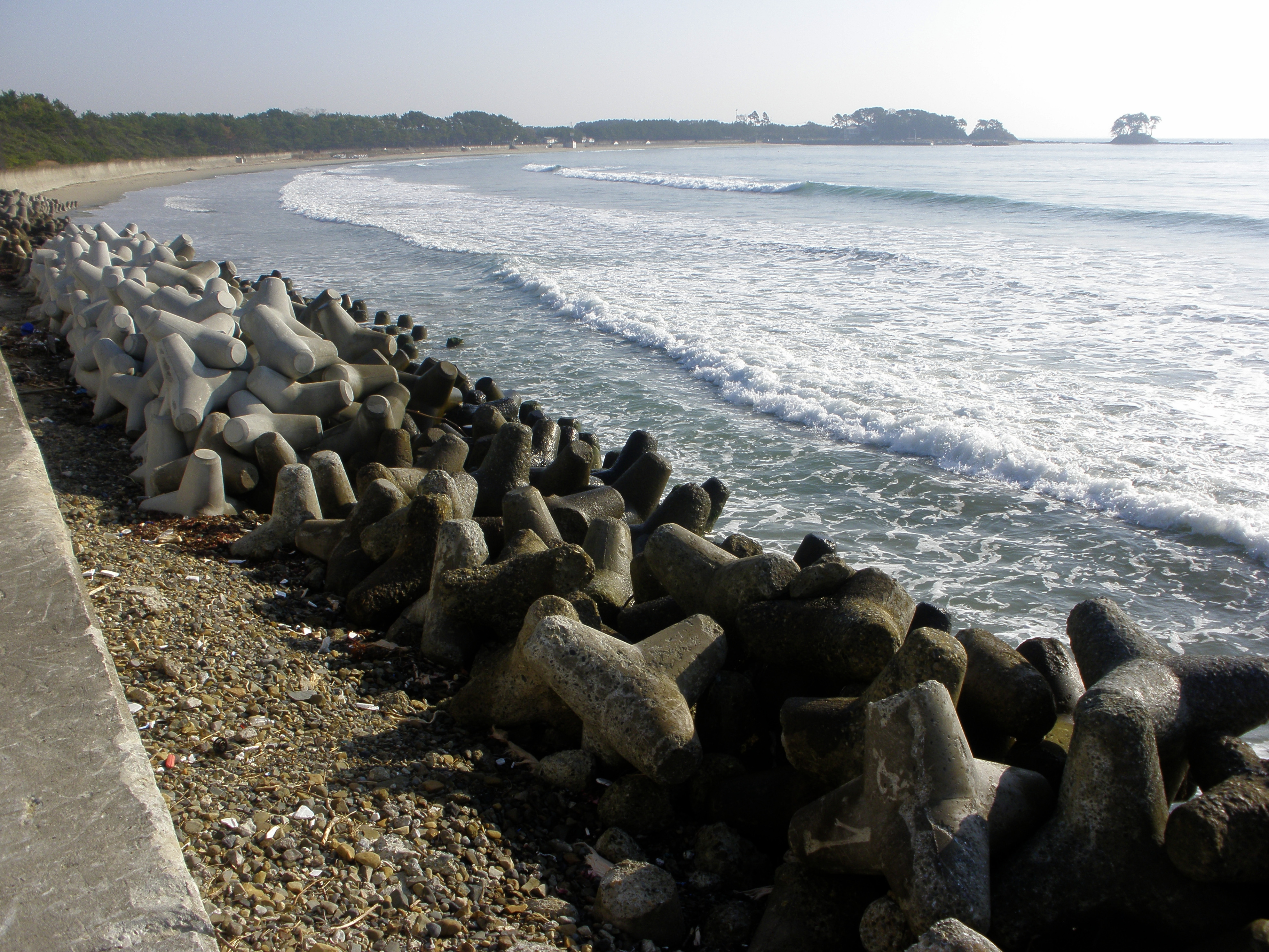 お伊勢浜海水浴場Oise-hama kaisuiyokujyou